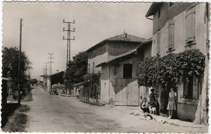 Cheyssieu (Isère). Une rue du village. Carte postale ancienne.